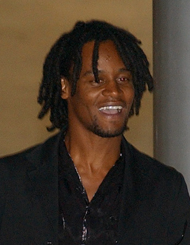 O cantor brasileiro Toni Garrido.